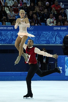 Алена Савченко и Робин Шолковы на Зимних Олимпийских играх 2014 (произвольная программа)